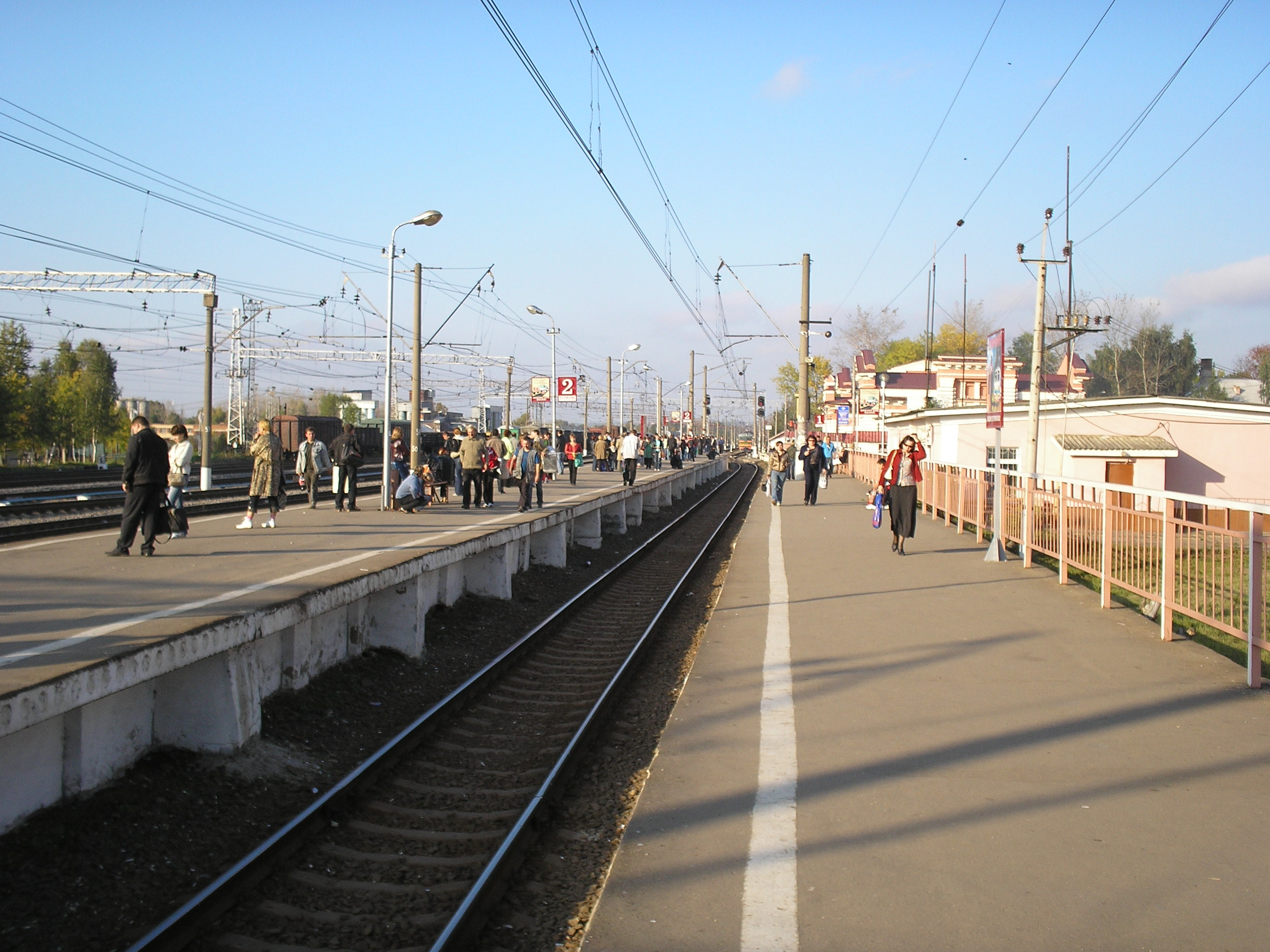 ст.Дмитров.